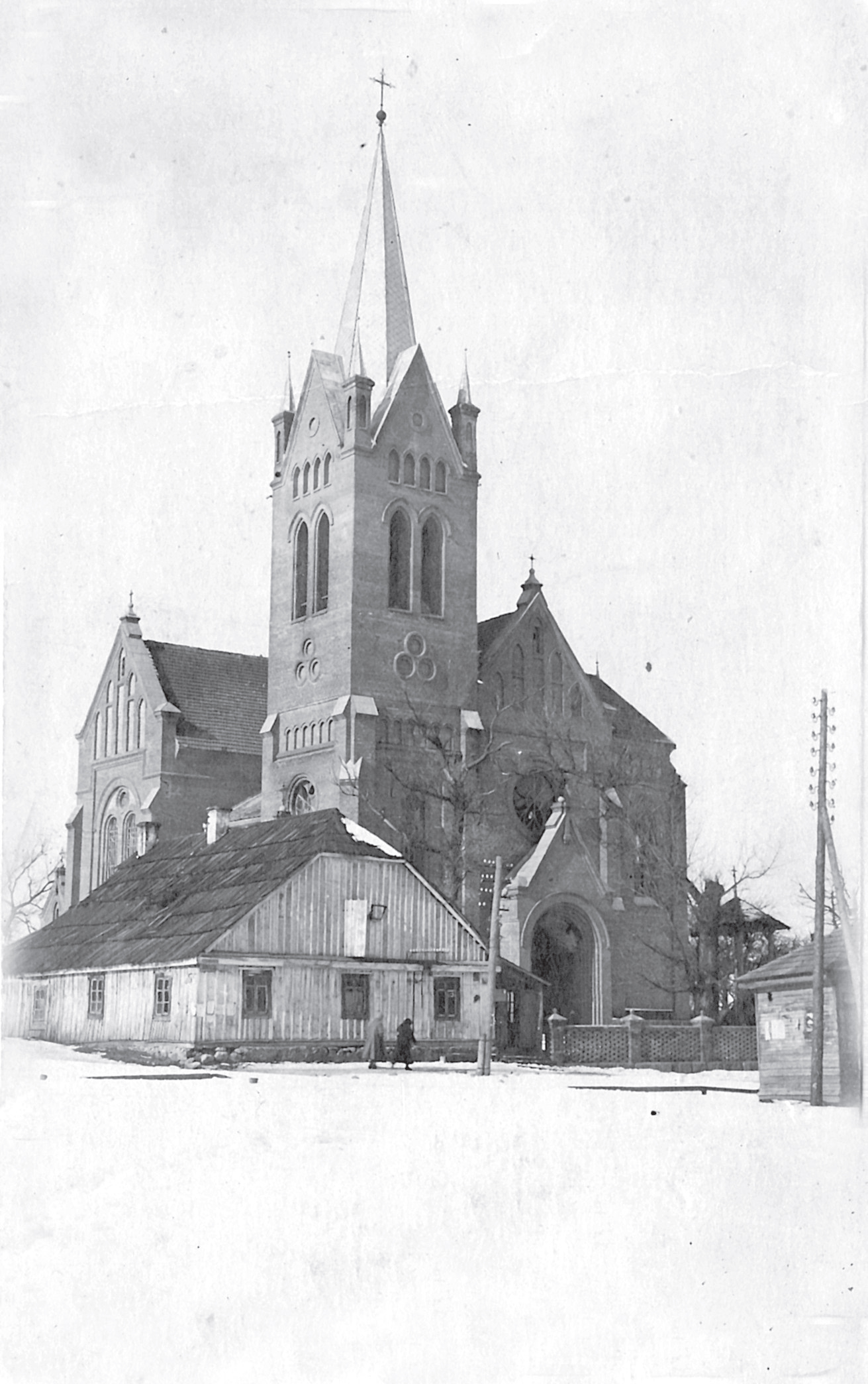 Беларуская (тарашкевіца): Вялейка (Vialejka), рог пляцу Рынку (plac Rynak) і вуліцы Асіпаўскай (vulica Asipaŭskaja). Касьцёл Узвышэньня Сьвятога Крыжа